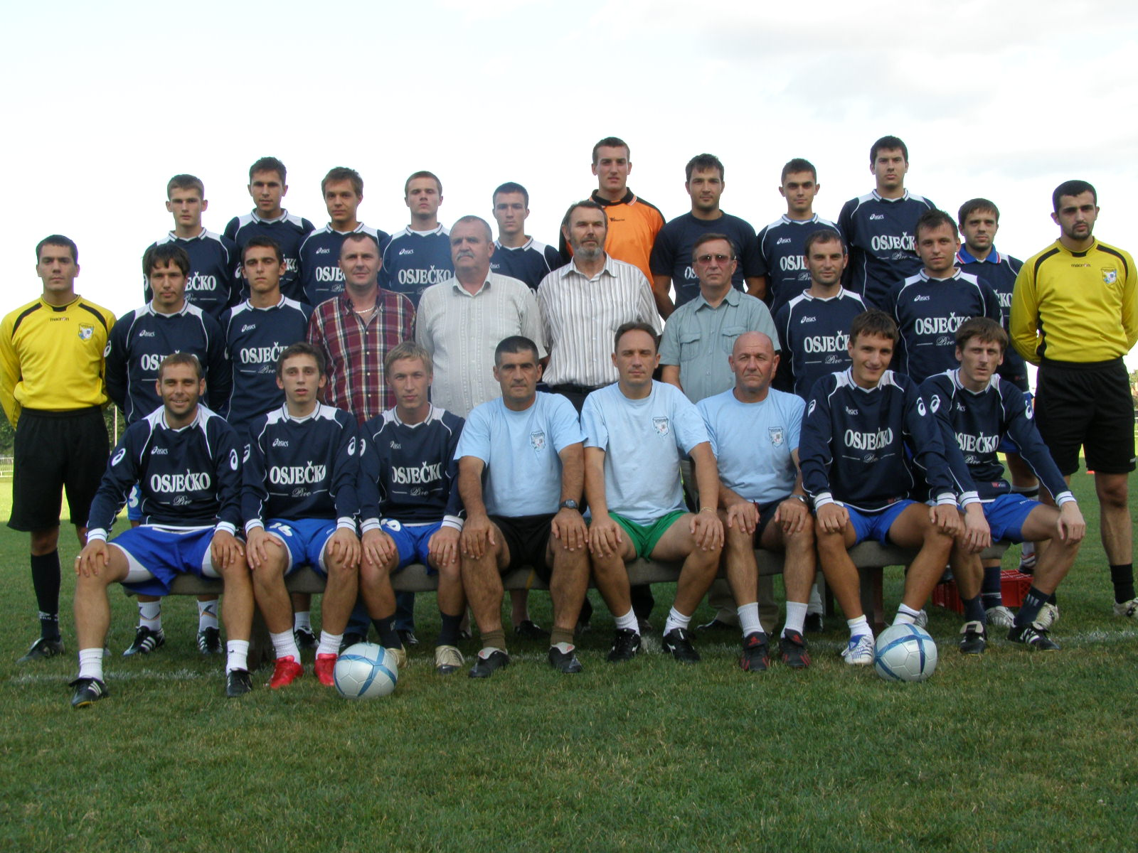 nogometni klub ŠNK Baranja-Belje, Beli Manastir